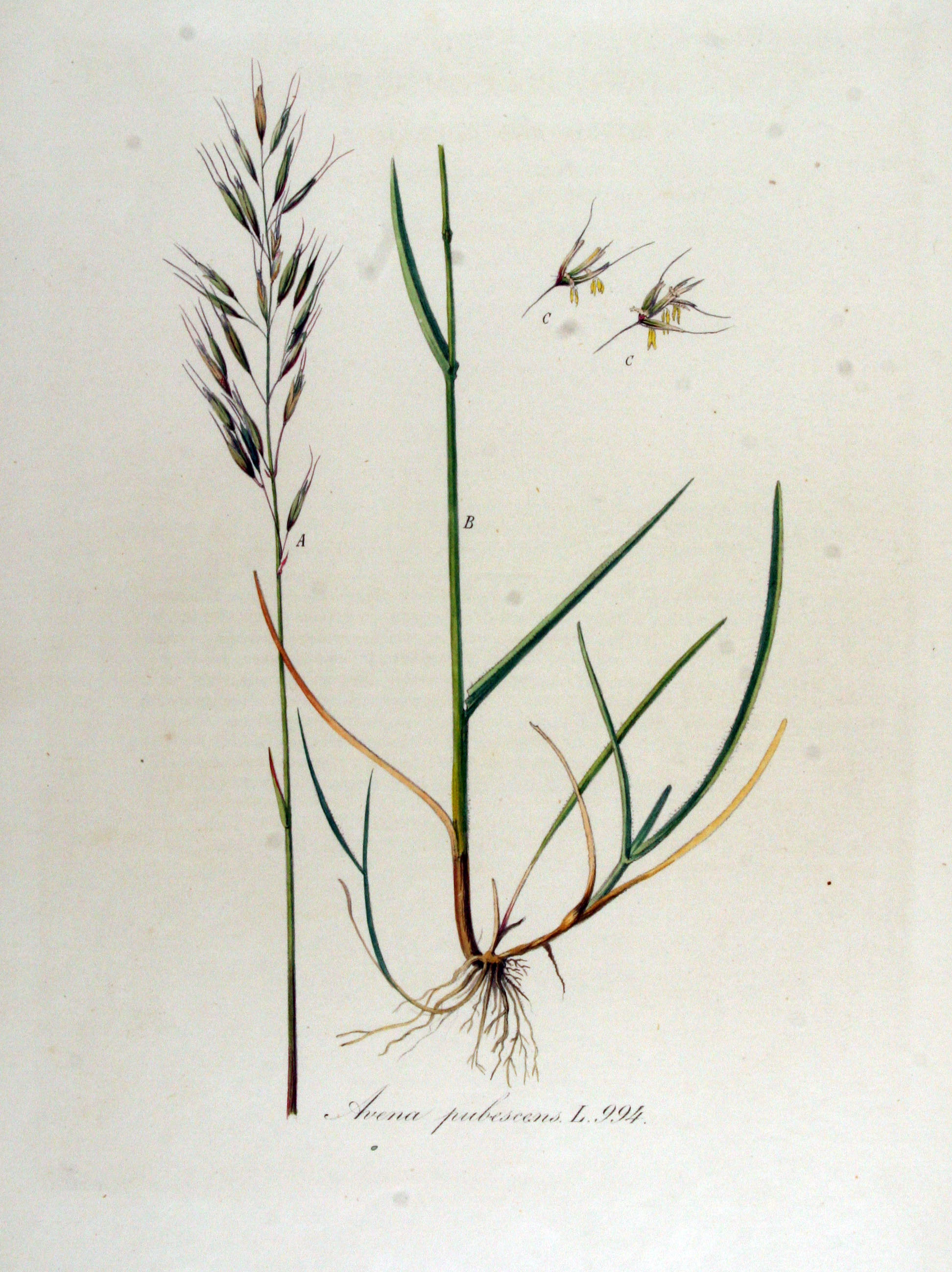 Avenula pubescens (Huds.) Dum. (Syn.Avena pubescens Huds.